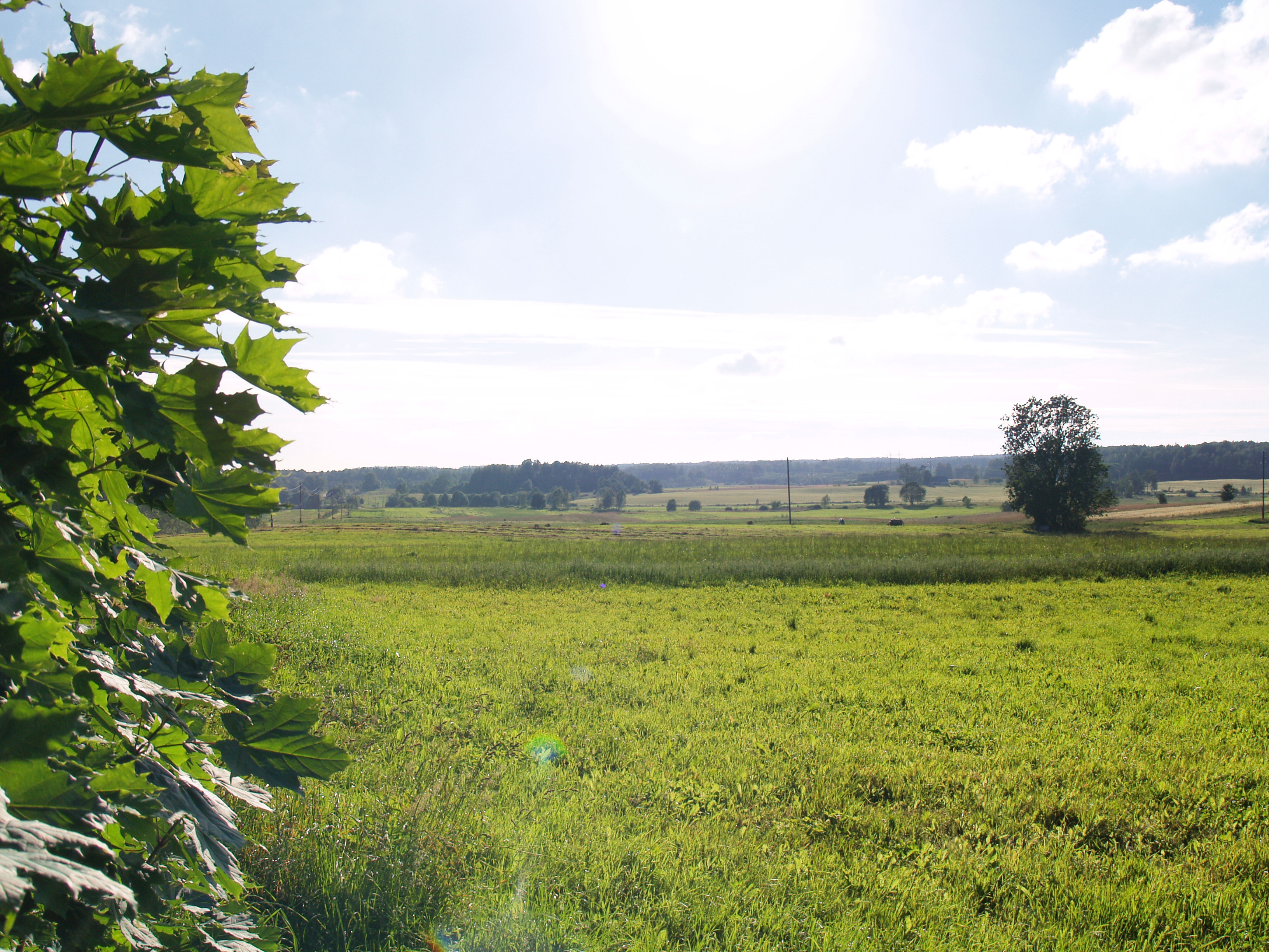 Tāšu Padures lauki (Tashu-Padure fields)